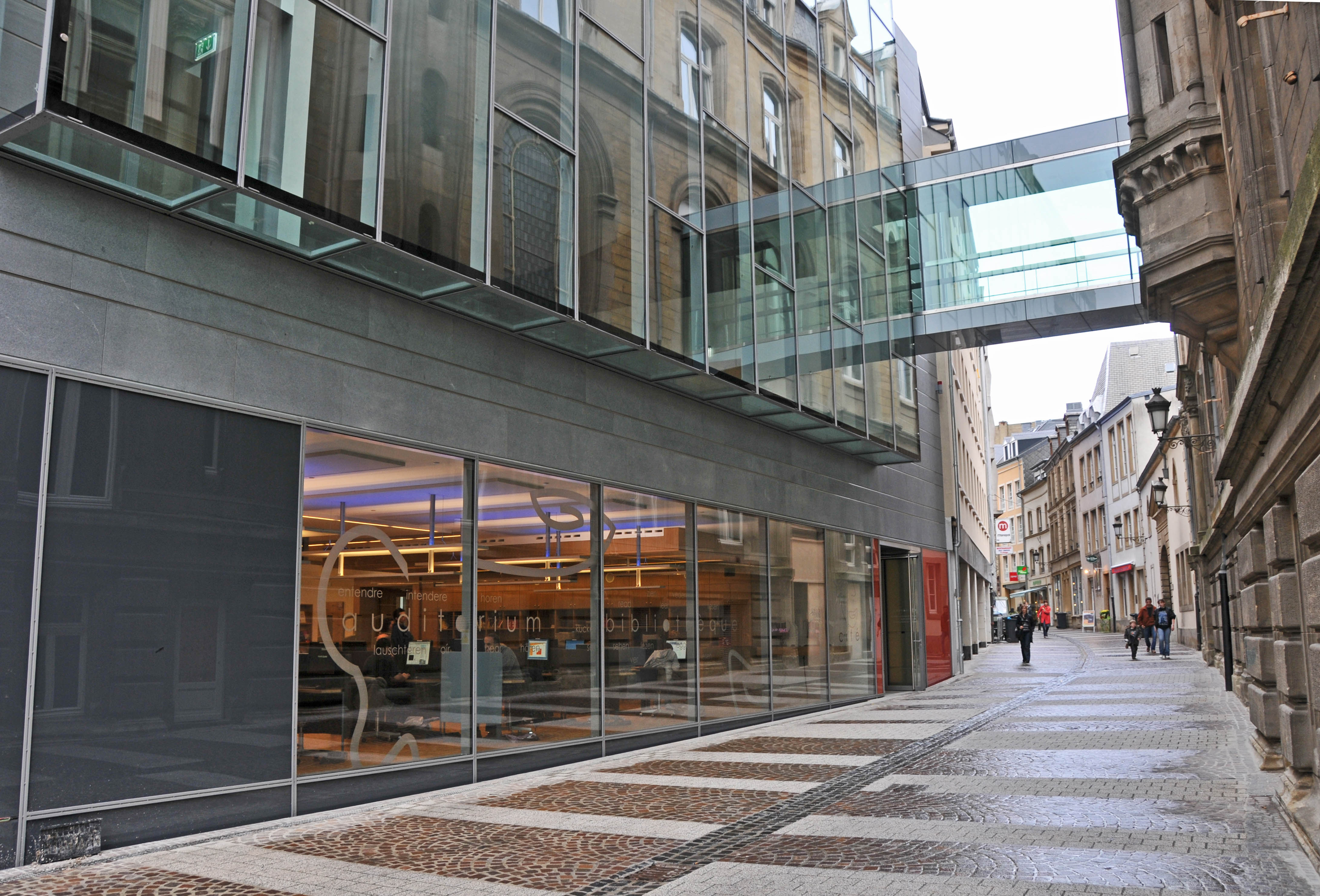 Bibliothéik vun der Stad Lëtzebuerg Auteur: Cayambe. Source: Eege Foto. Erlaabnes vun der Directrice Lizenz: Creative Commons